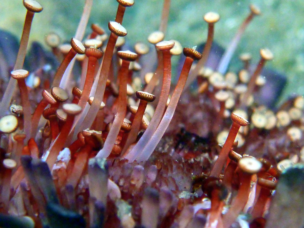 Gros-plan sur les podia d'un oursin-tortue (Colobocentrotus atratus) au lagon de l'Etang-Salé à la Réunion.